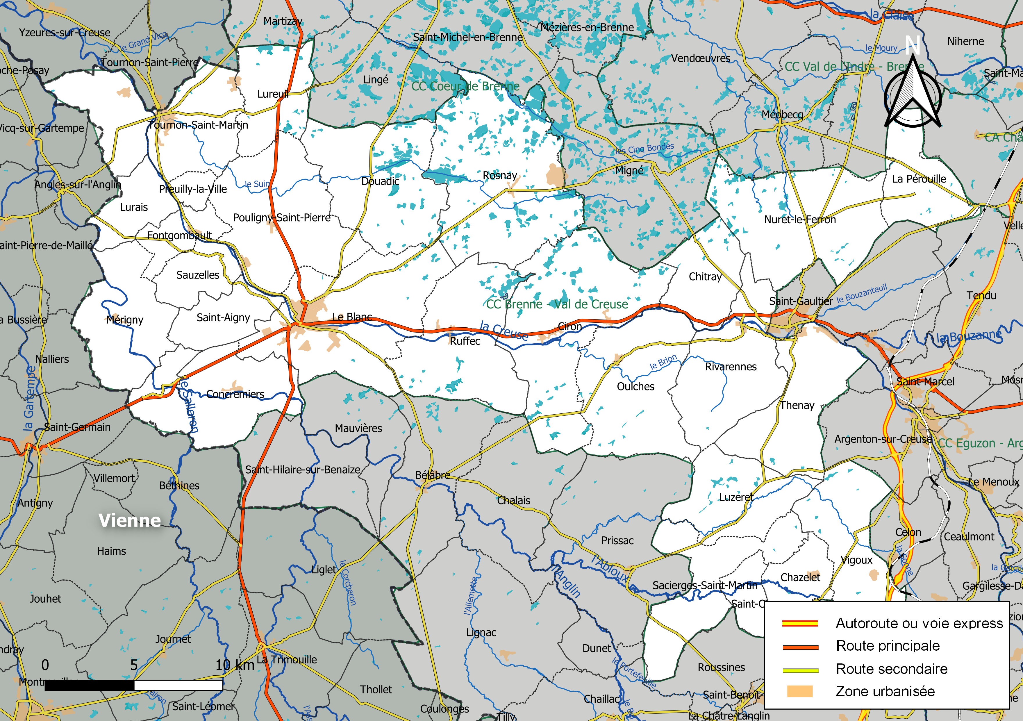 Carte de la communauté de communes Brenne - Val de Creuse, département de l'Indre, France. Composition au 1er janvier 2019.